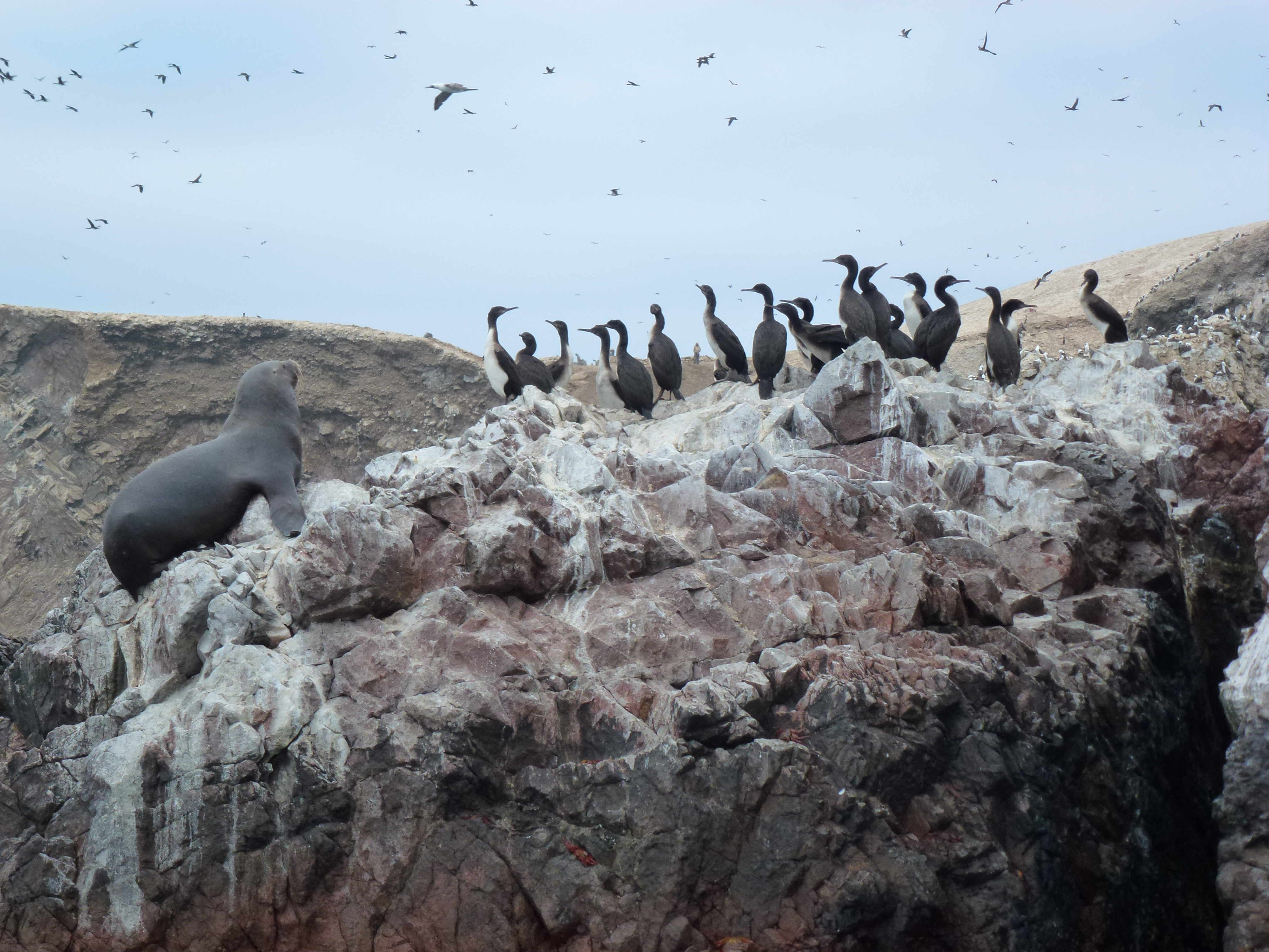 les Îles Ballestas et la Réserve nationale de Paracas Pérou